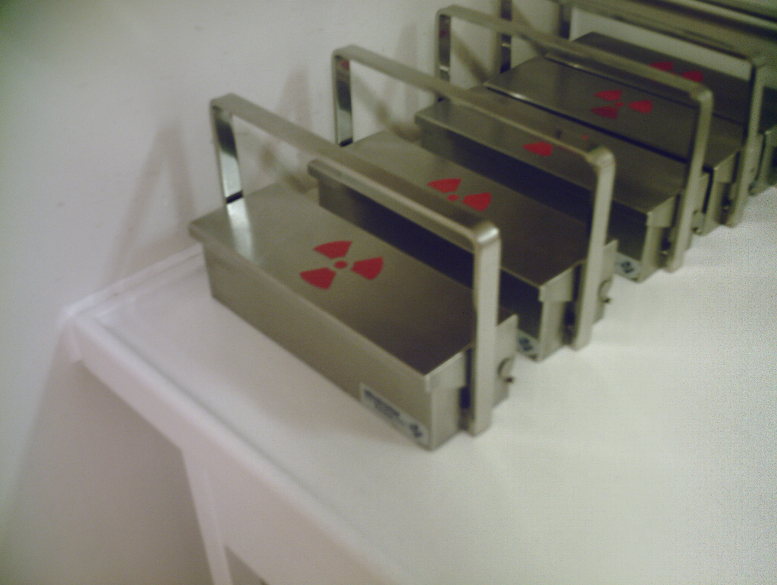 Conteneur plombé, permettant le transport des seringues de technétium 99m dans les services de médecine nucléaire avant injection pour tomographie par émissions monophotoniques.